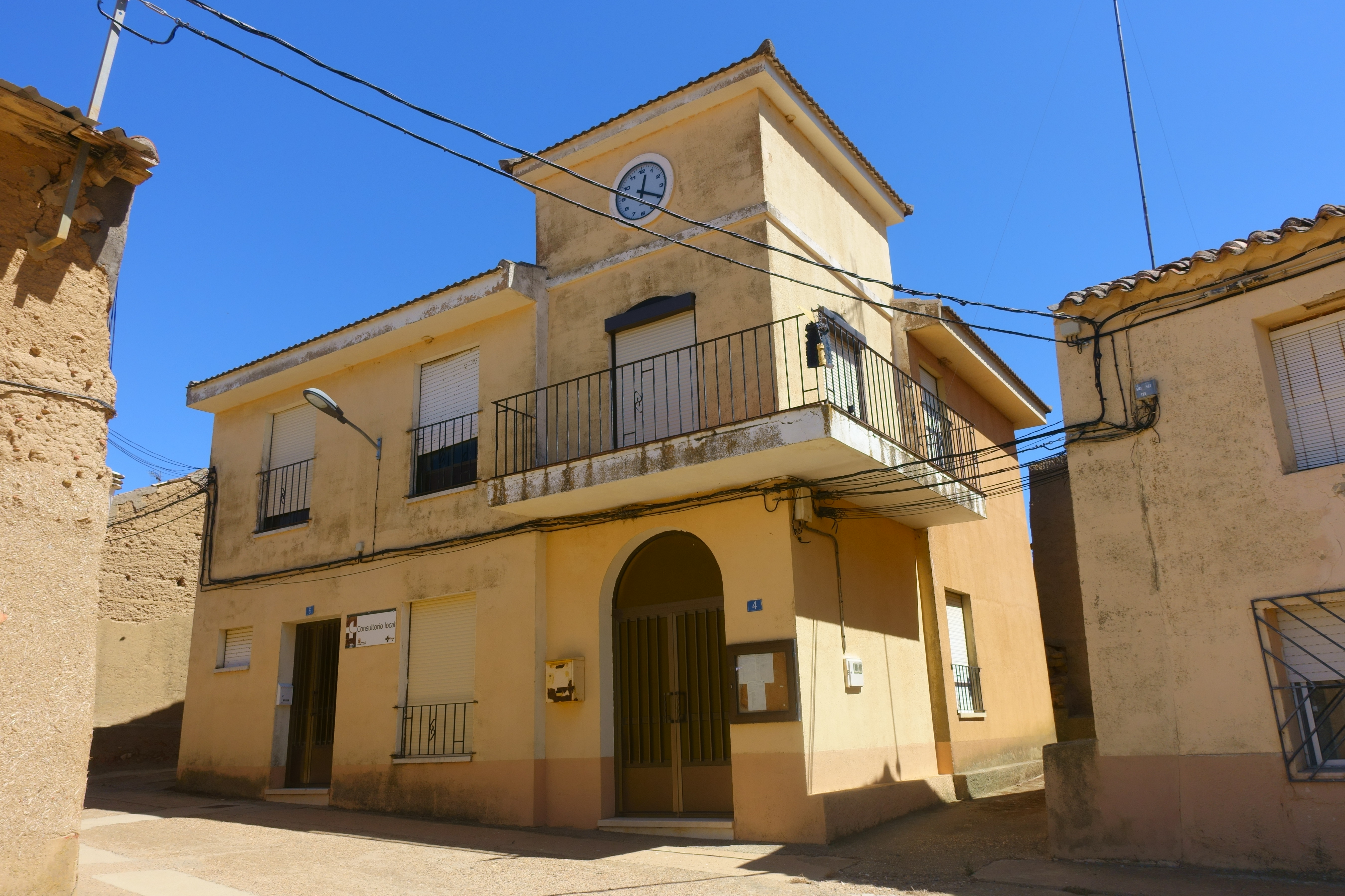 Casa consistorial de Villar de Fallaves (Zamora, España).